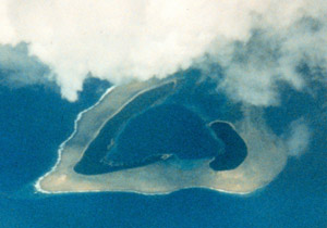 un atoll dans l'océan Pacifique occidental